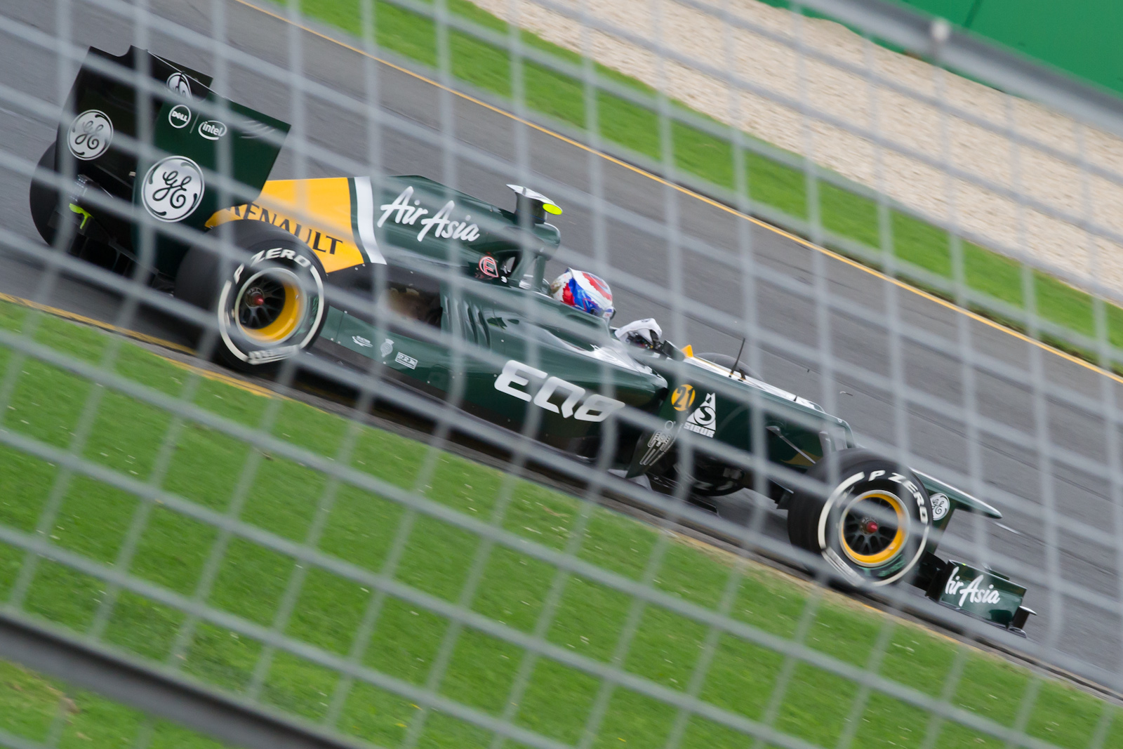 2012 Australian Grand Prix — Vitaly Petrov